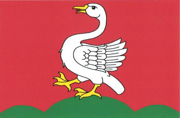 Lestkov, okres Tachov, vlajka